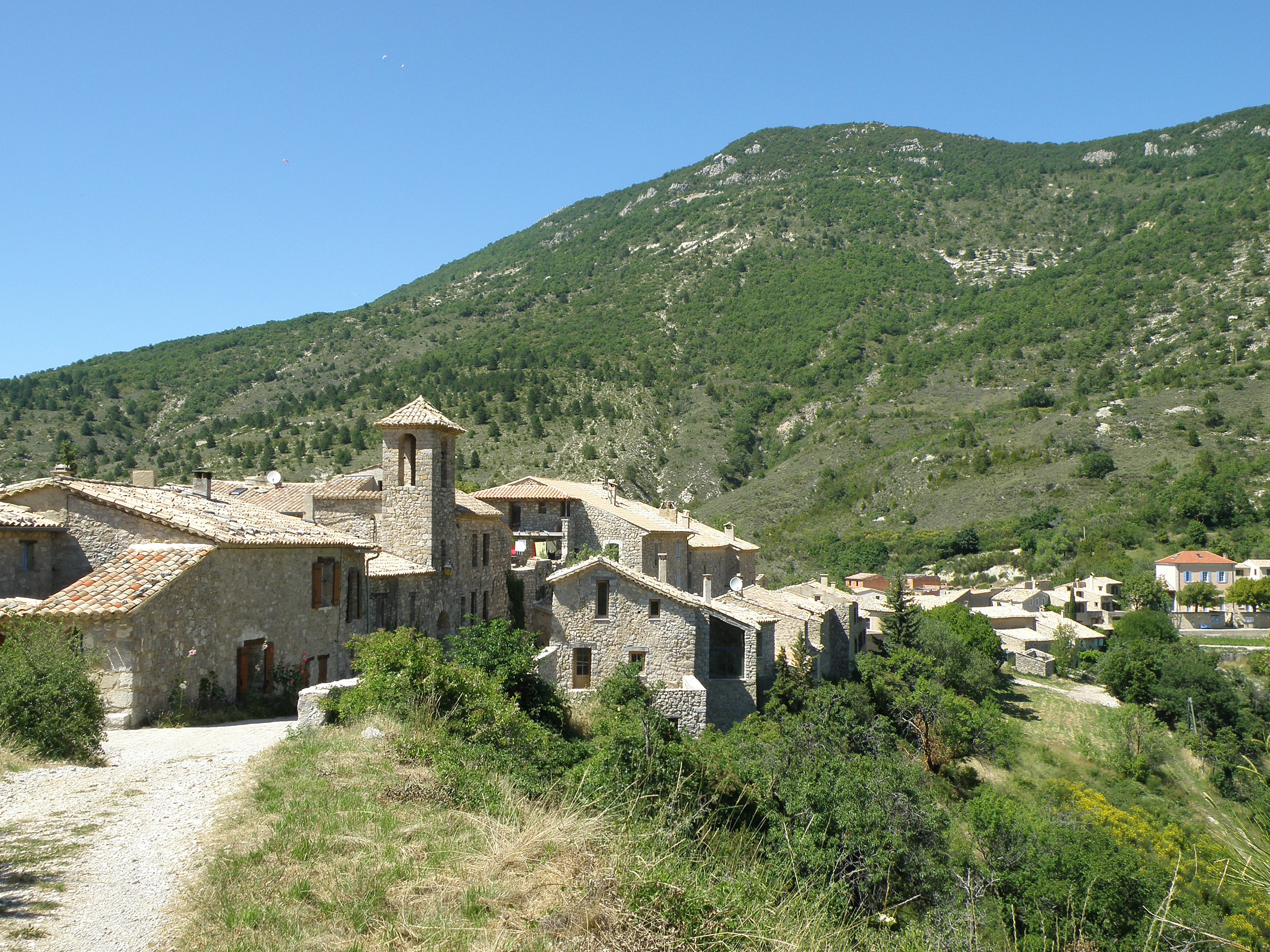 Le Poët-Sigillat (Drôme, France). Vue générale. A l'avant-plan à gauche, clocher de la Chapelle Saint-Bernard. Au loin à droite, mairie. À l'arrière-plan, montagne de Buisseron (alt. 1269m). Remarquer dans le ciel à gauche, trois parapentistes.